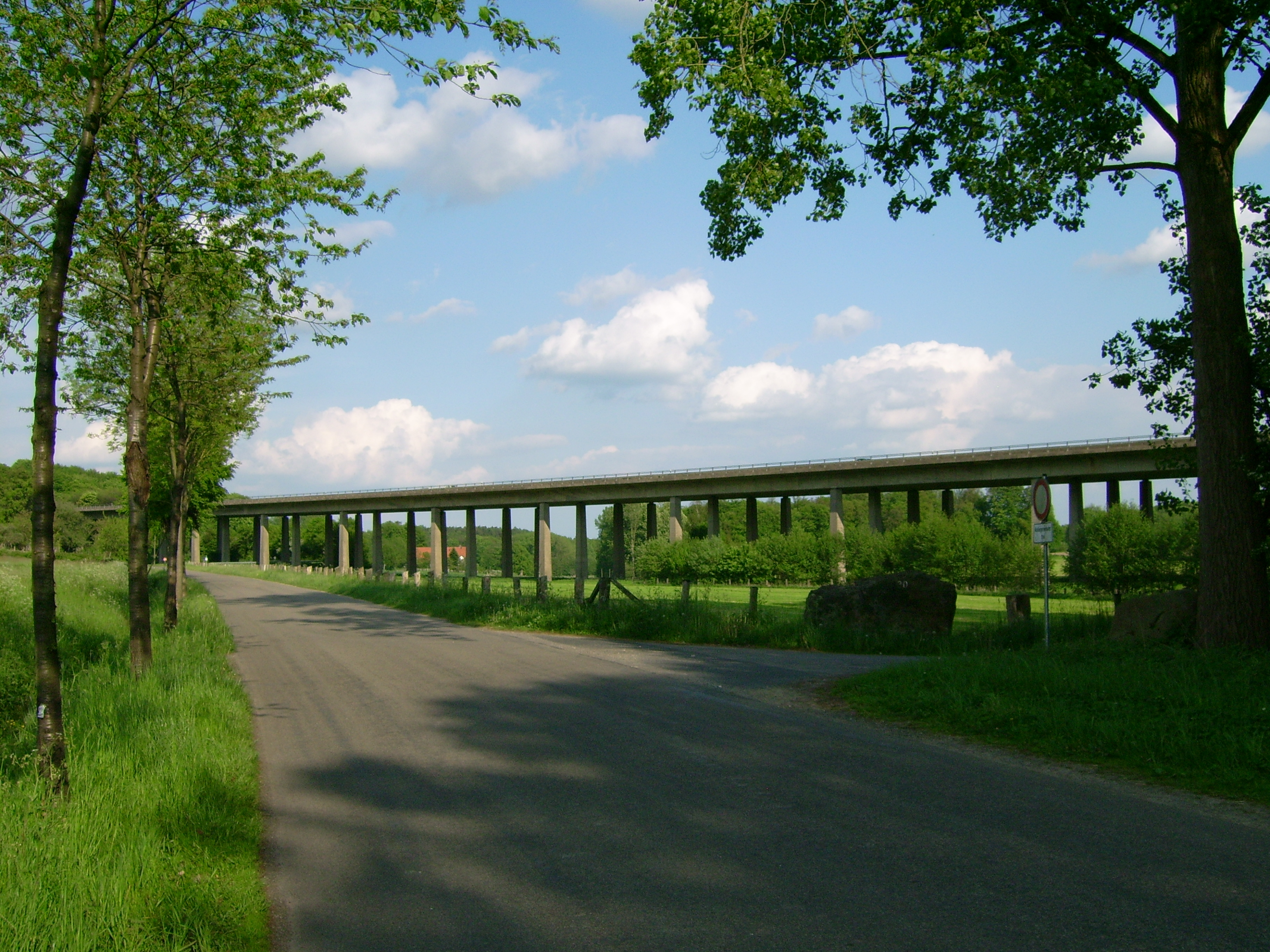 Talbrücke Exterheide der Autobahn 1 bei Lengerich